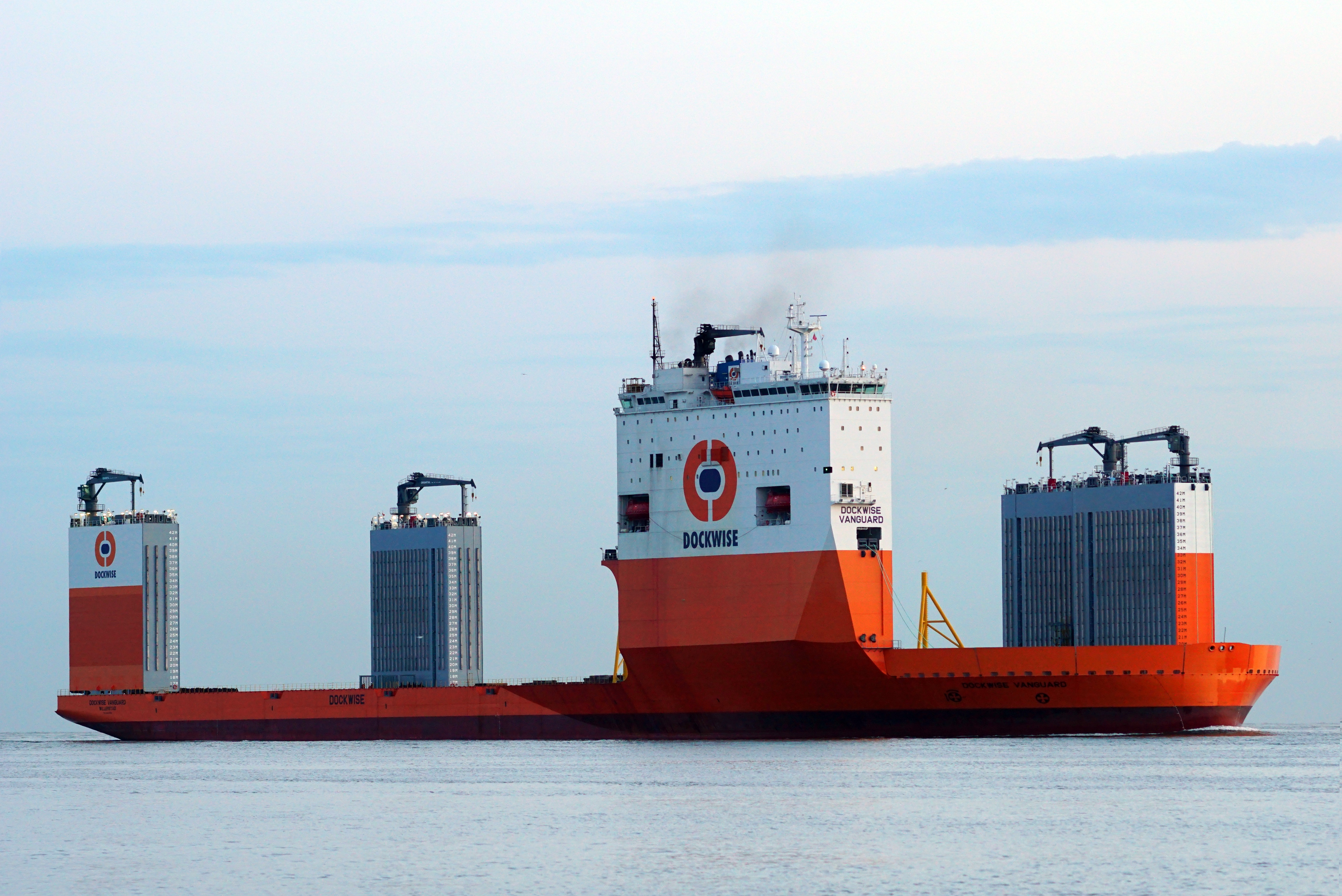 Aankomst Maasmond 06.00 uur 5-8-2014